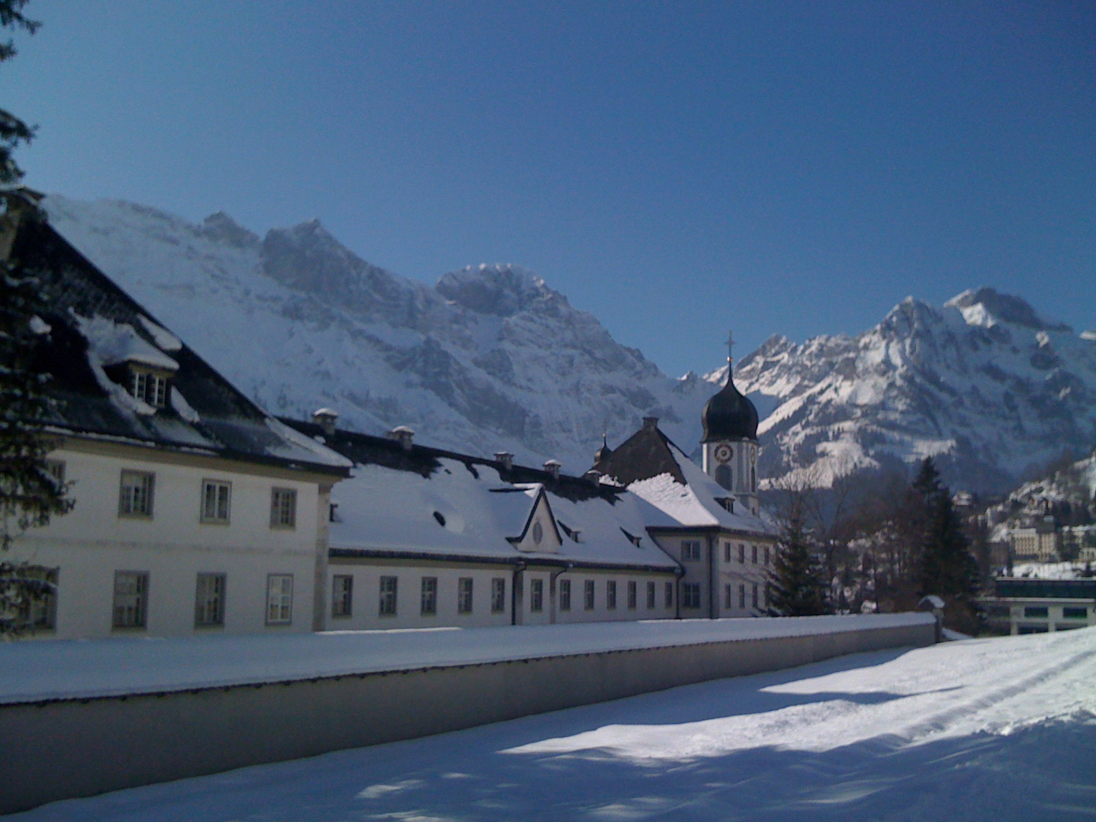 Kloster Engelberg im Winter